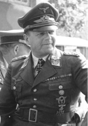 德國空軍元帥 埃爾哈德·米爾希單人照